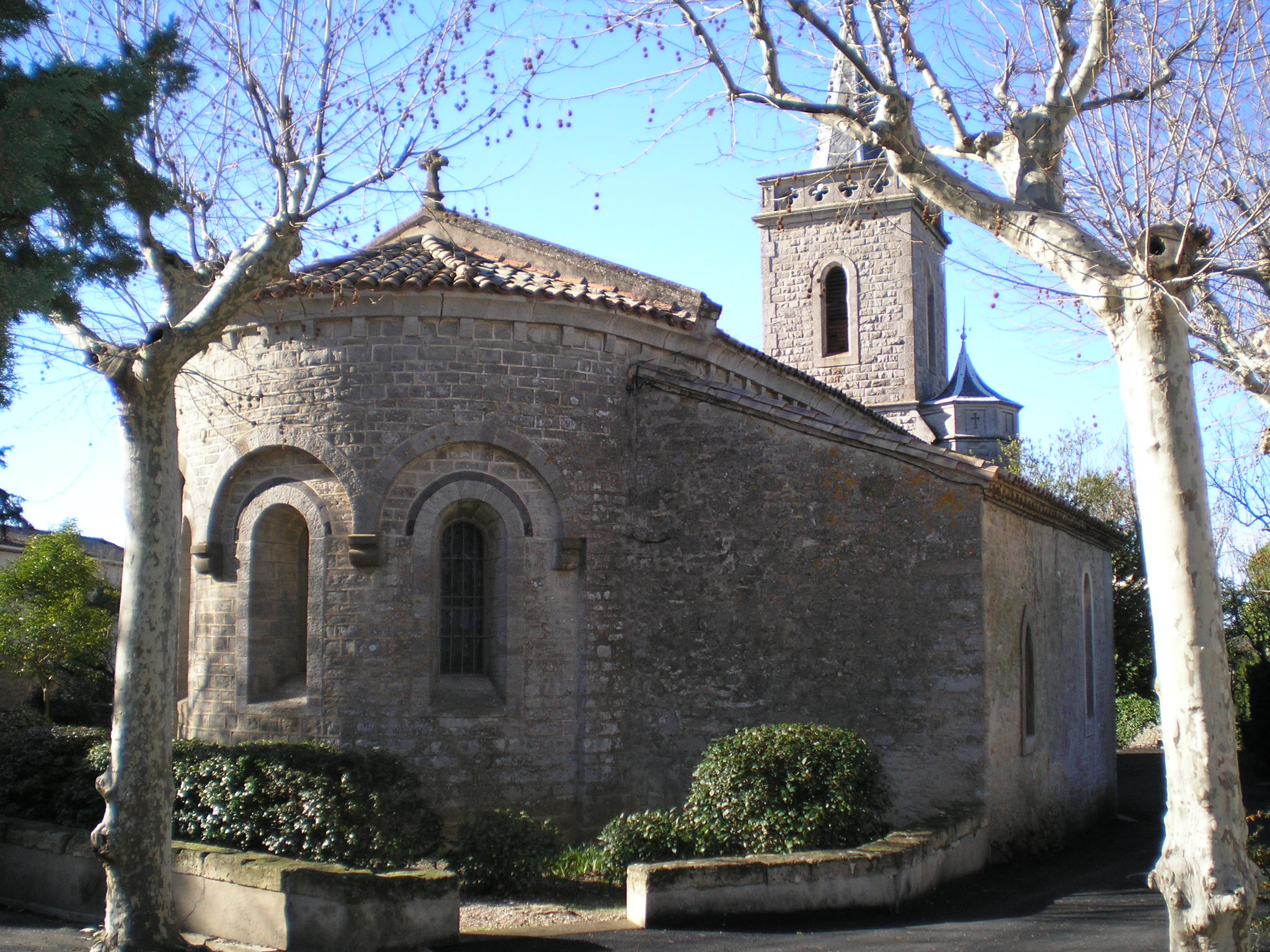 Beaufort (Hérault) - chevet roman de l'église Saint-Martin.